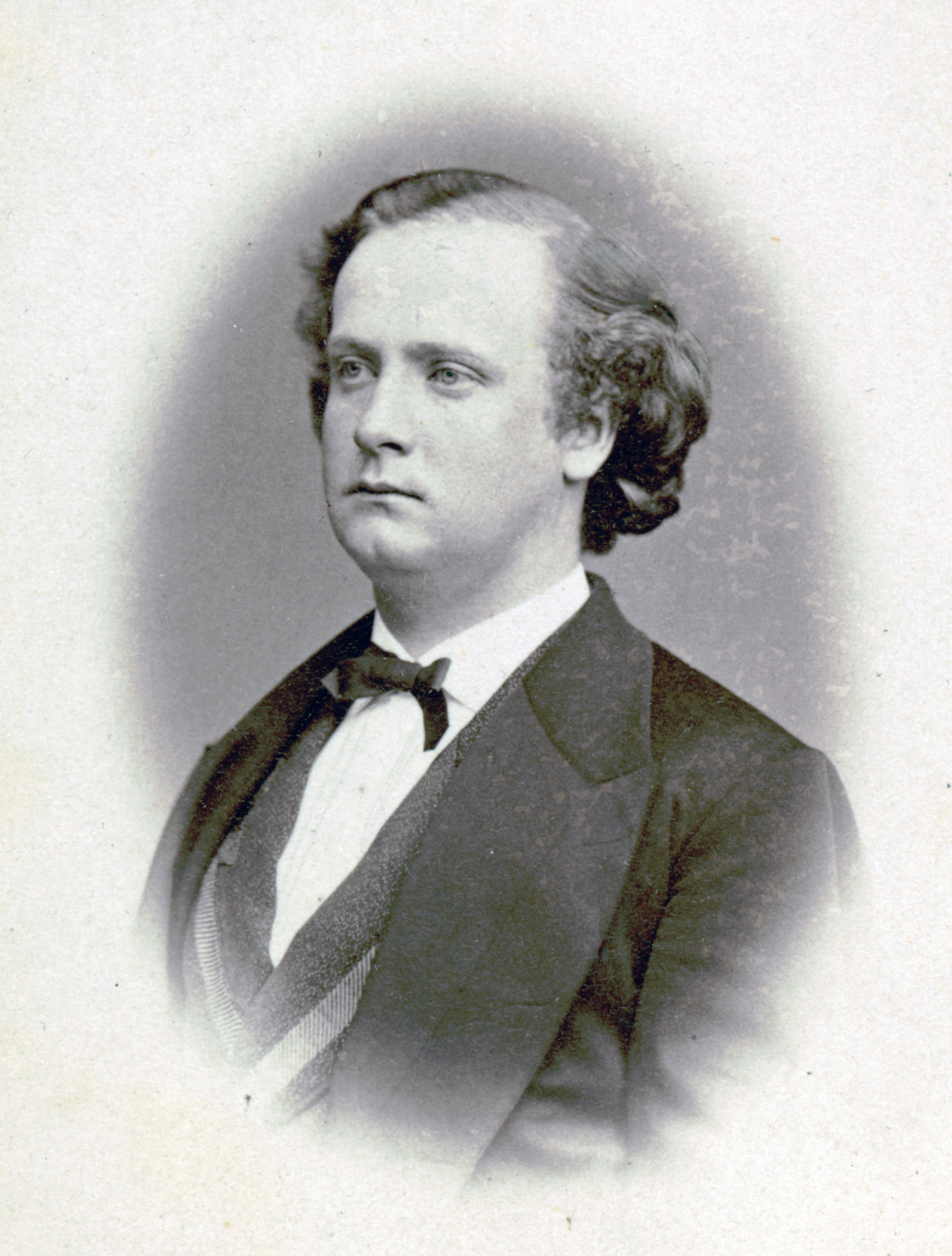 Operasångaren Hjalmar Håkansson 1882